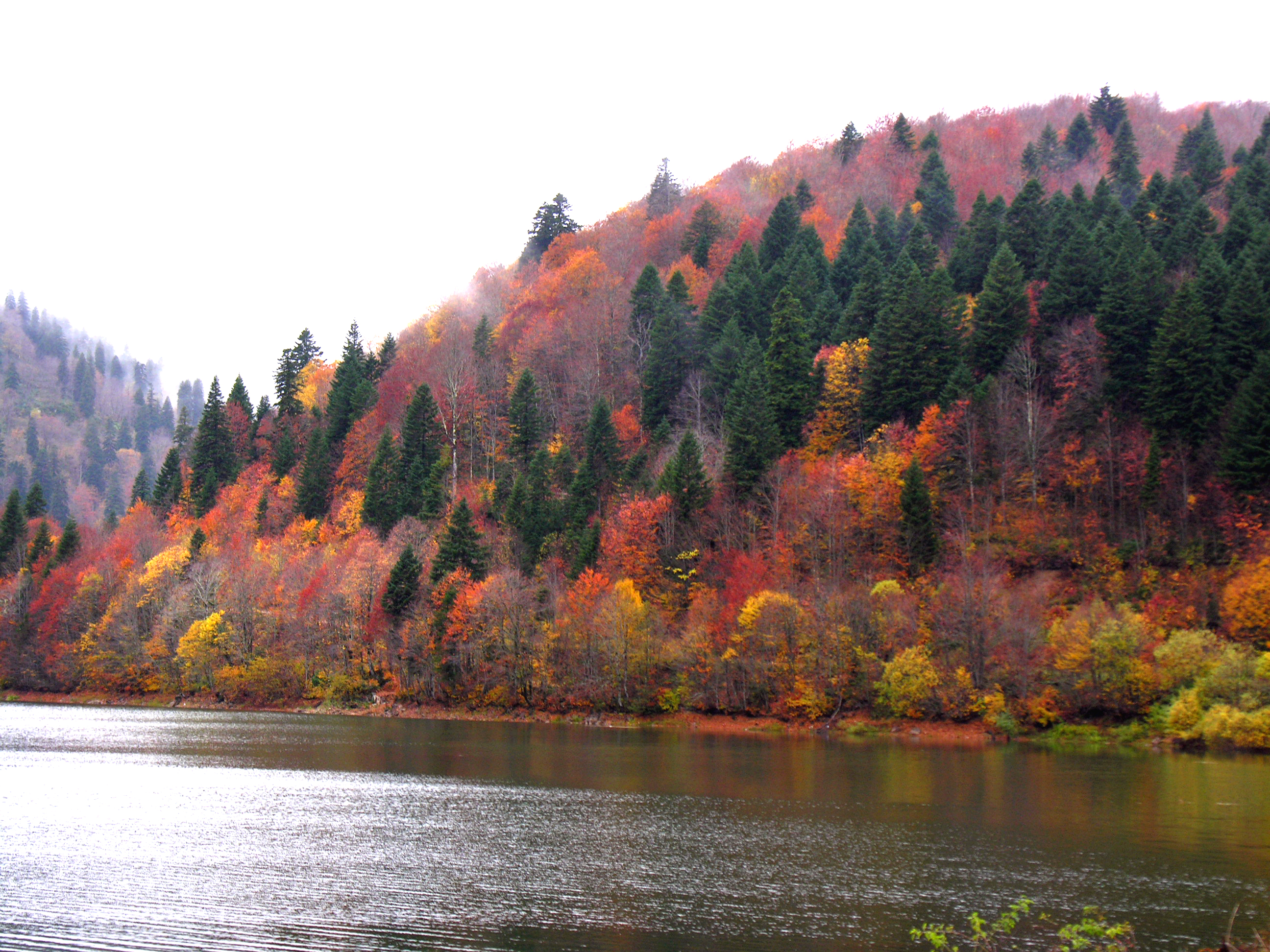 შაორის წყალსაცავი